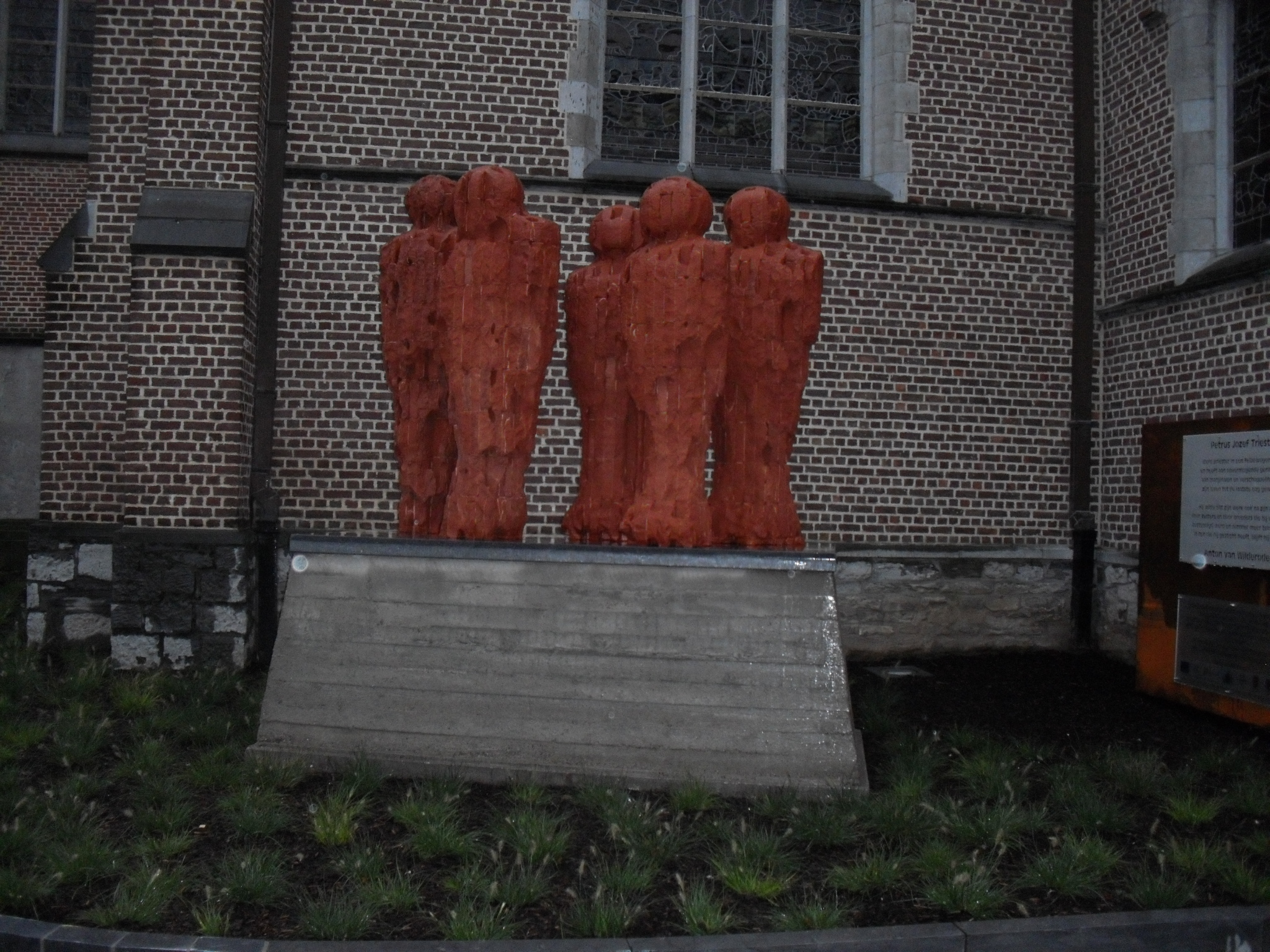 Monument Petrus Jozef Triest (1760-1836) - nabij kerk - Dorp - Lovendegem - Oost-Vlaanderen - Vlaanderen - België Werk van beeldhouwer Marc Cordenier - Gijverinkhove – Alveringem – België